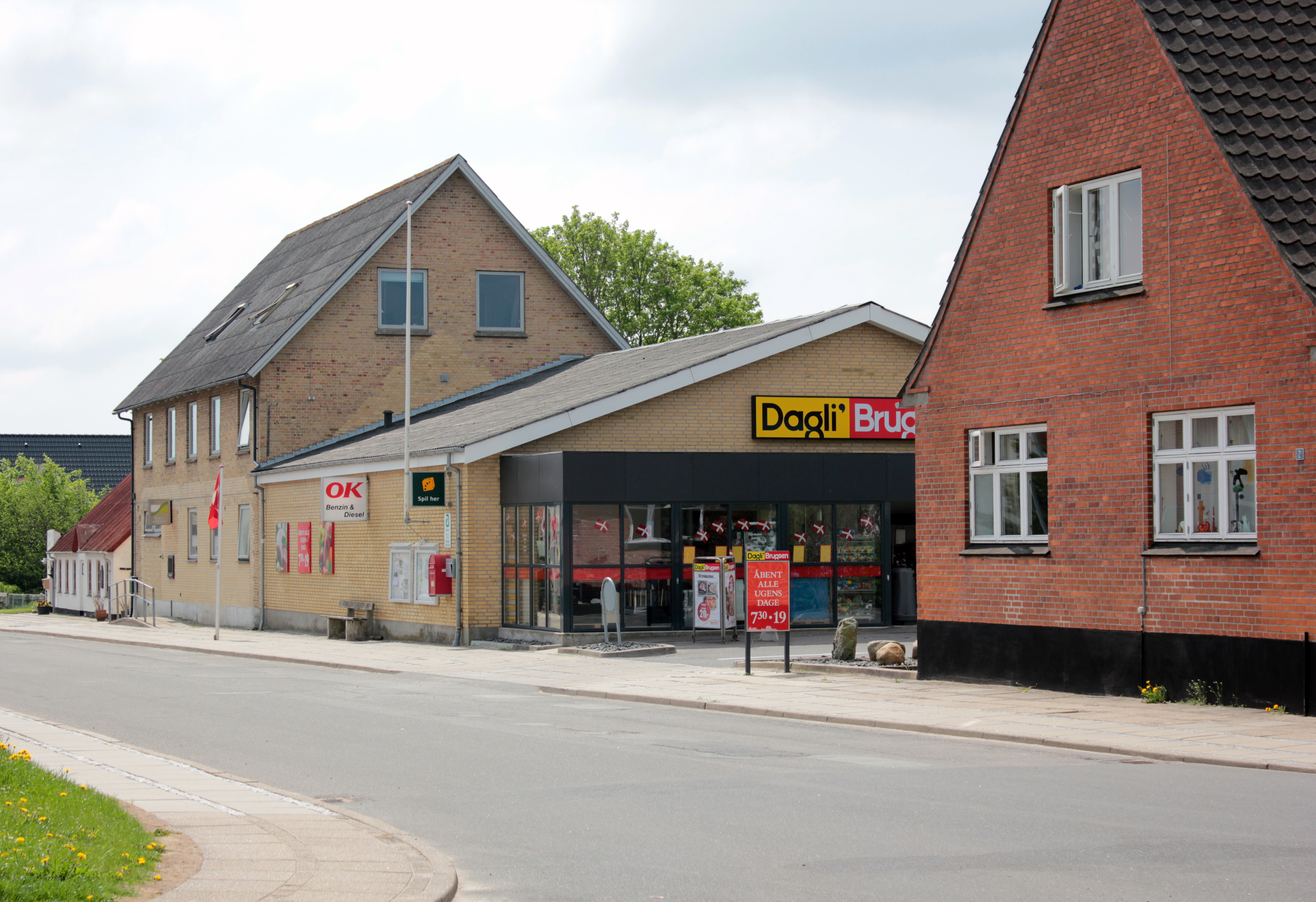 Parti ved brugsen